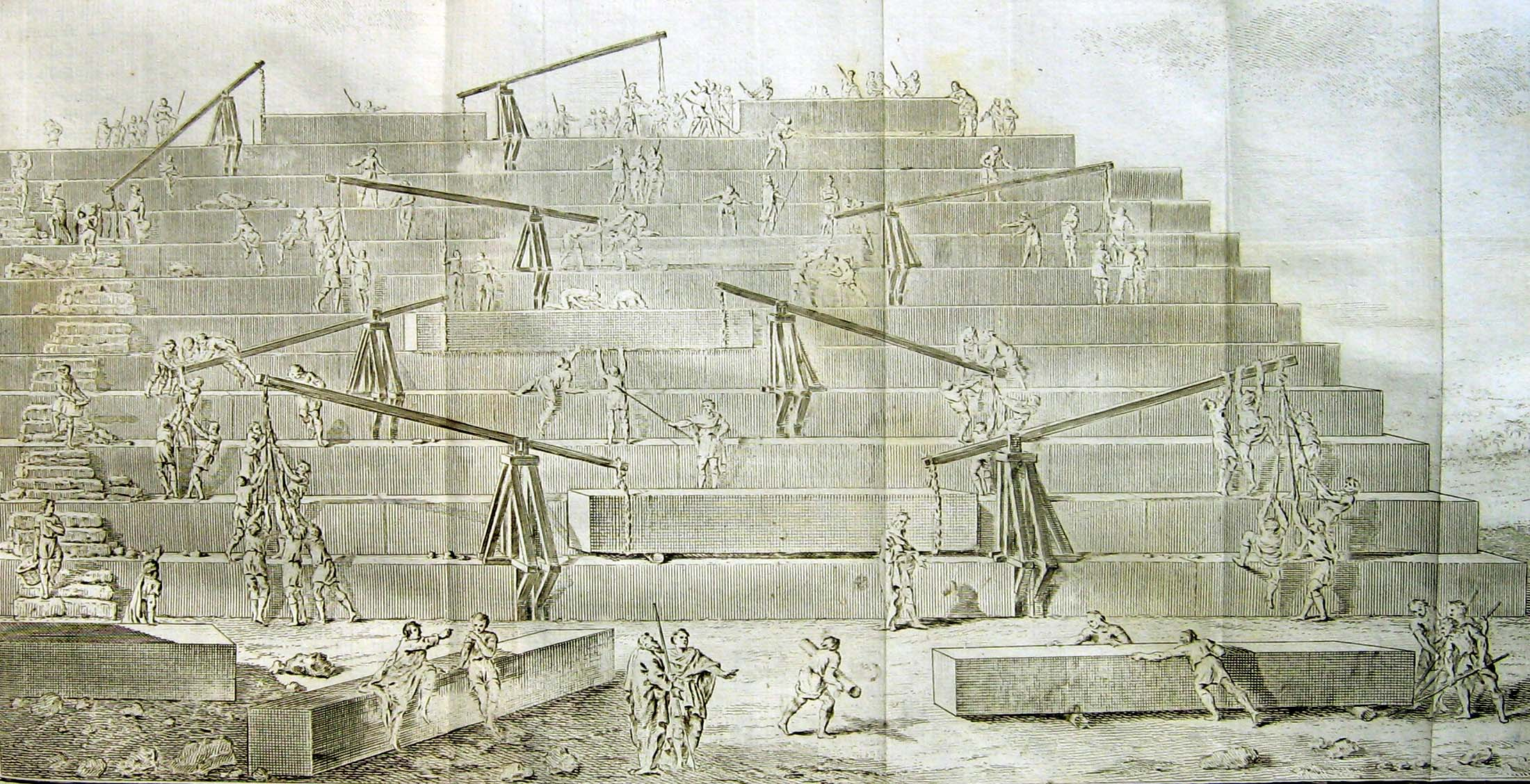 Interprétation du témoignage d'Hérodote (construction d'une grande pyramide)